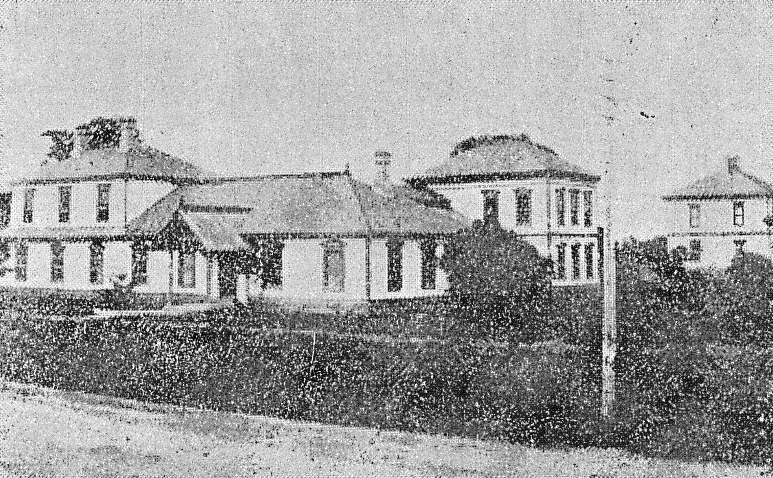 1880年当時の札幌農学校の校舎の一部、寄宿舎、復習講堂・食堂、化学講堂